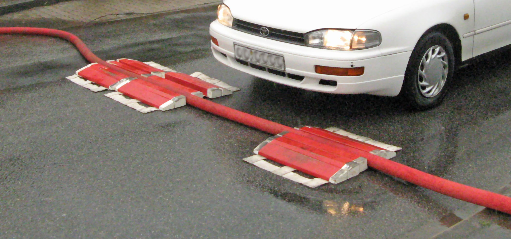 Schlauchbrücke